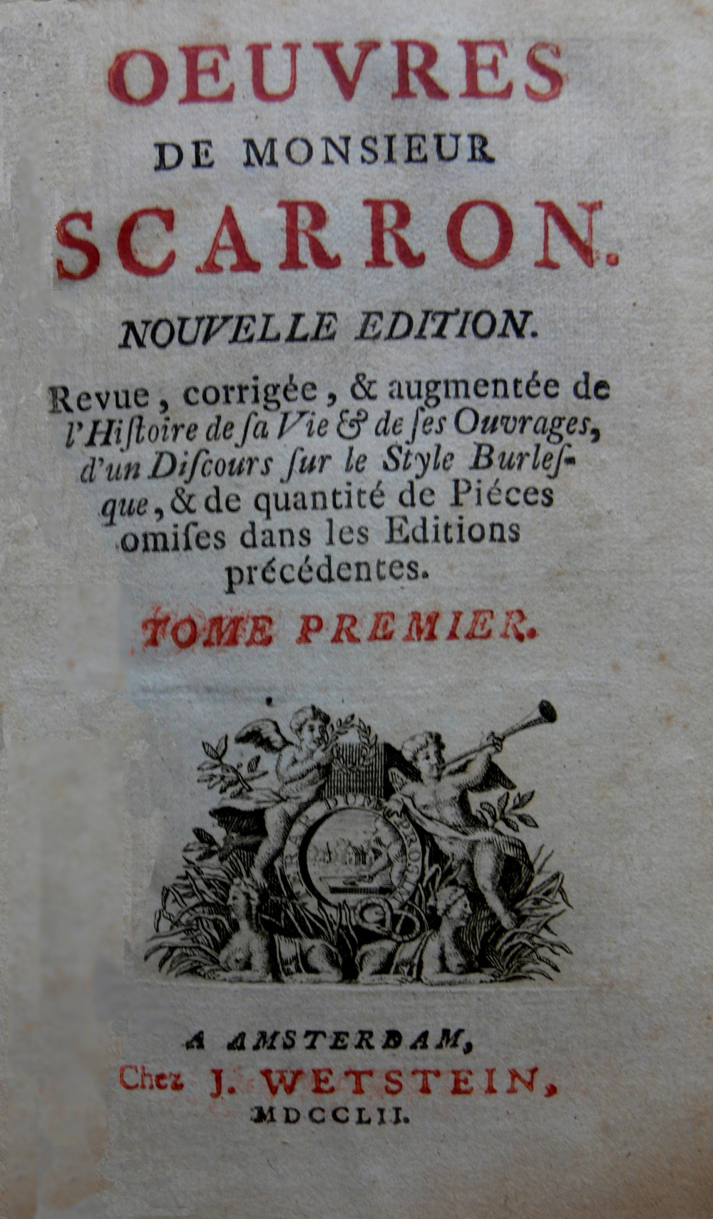 Édition de 1752 des Oeuvres de Scarron